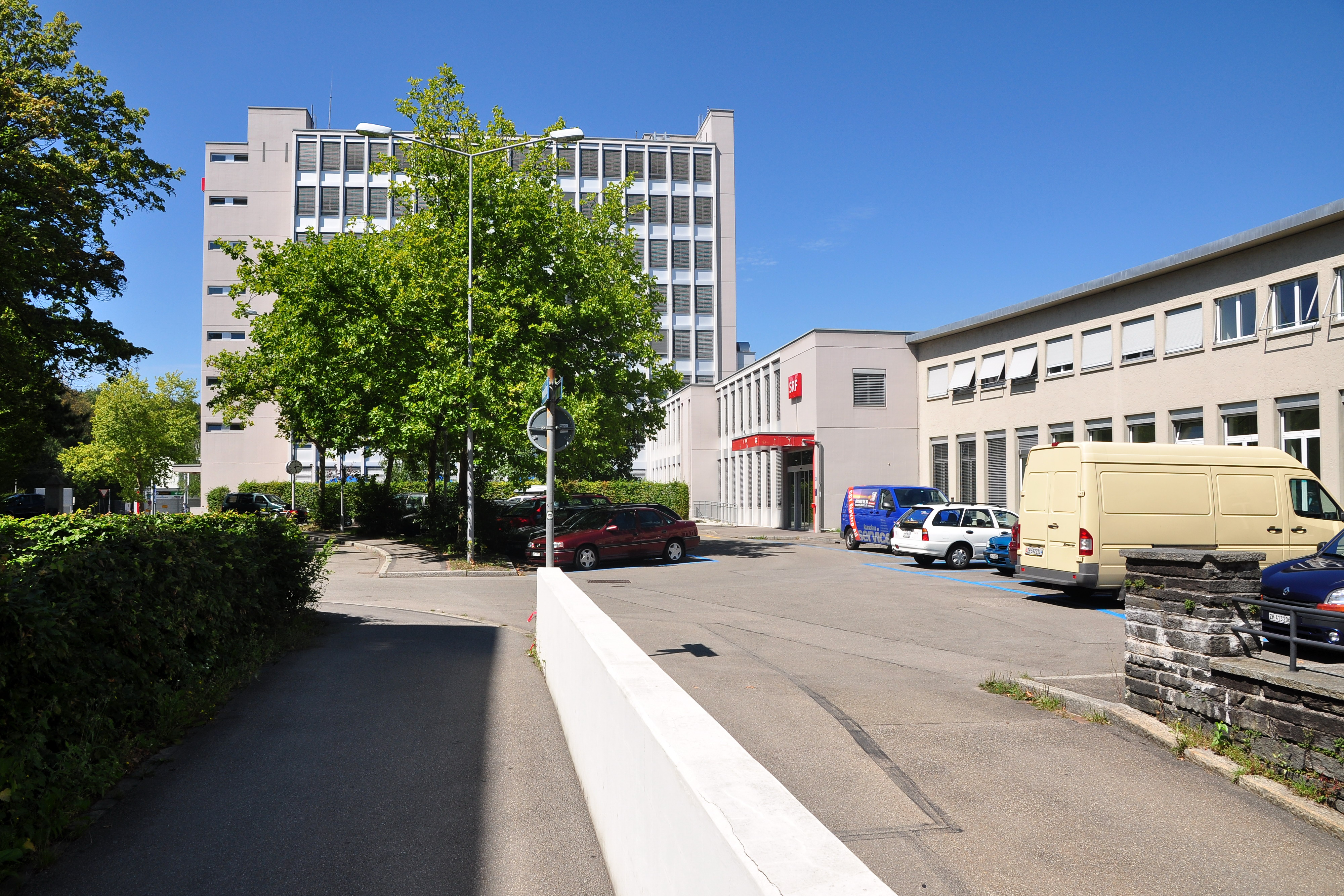 Schweizer Radio DRS in Zürich-Oerlikon (Switzerland)